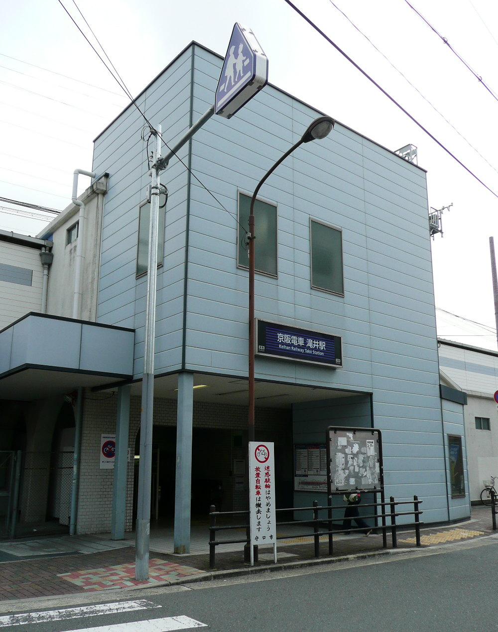 滝井駅西口